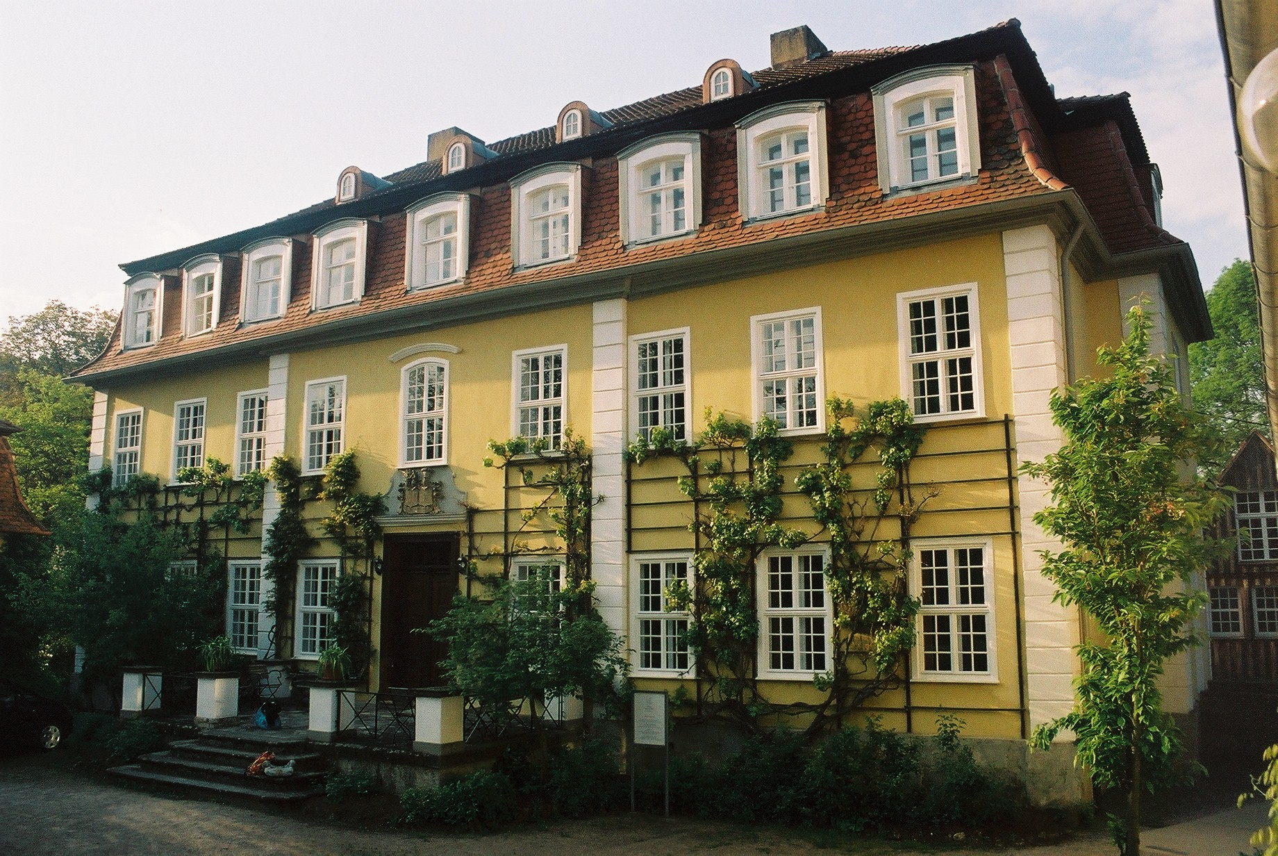 Herrenhaus of estate Adam von Trott zu Solz in Imshausen near Bebra